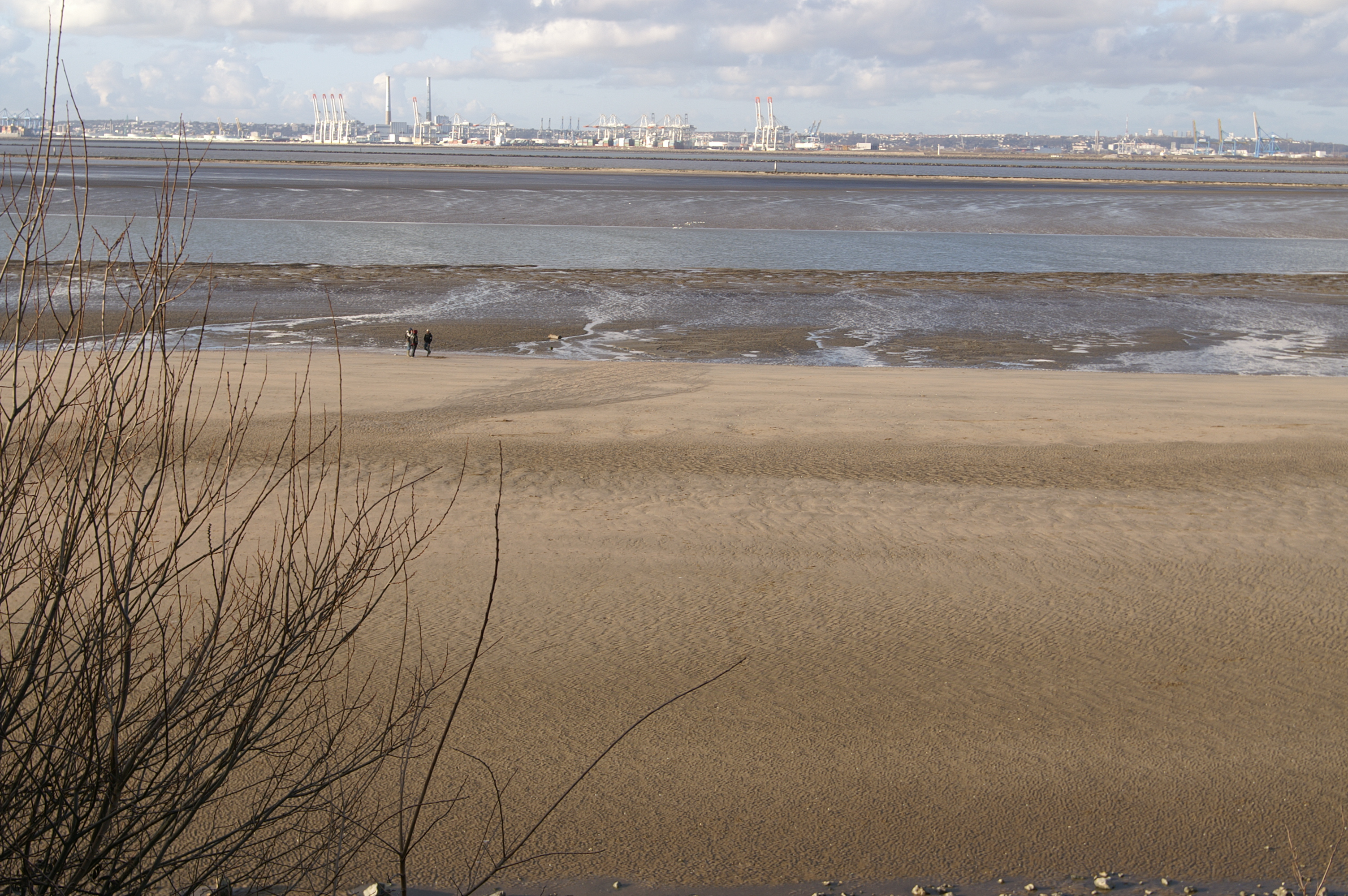 Plage de Vasouy à Honfleur.